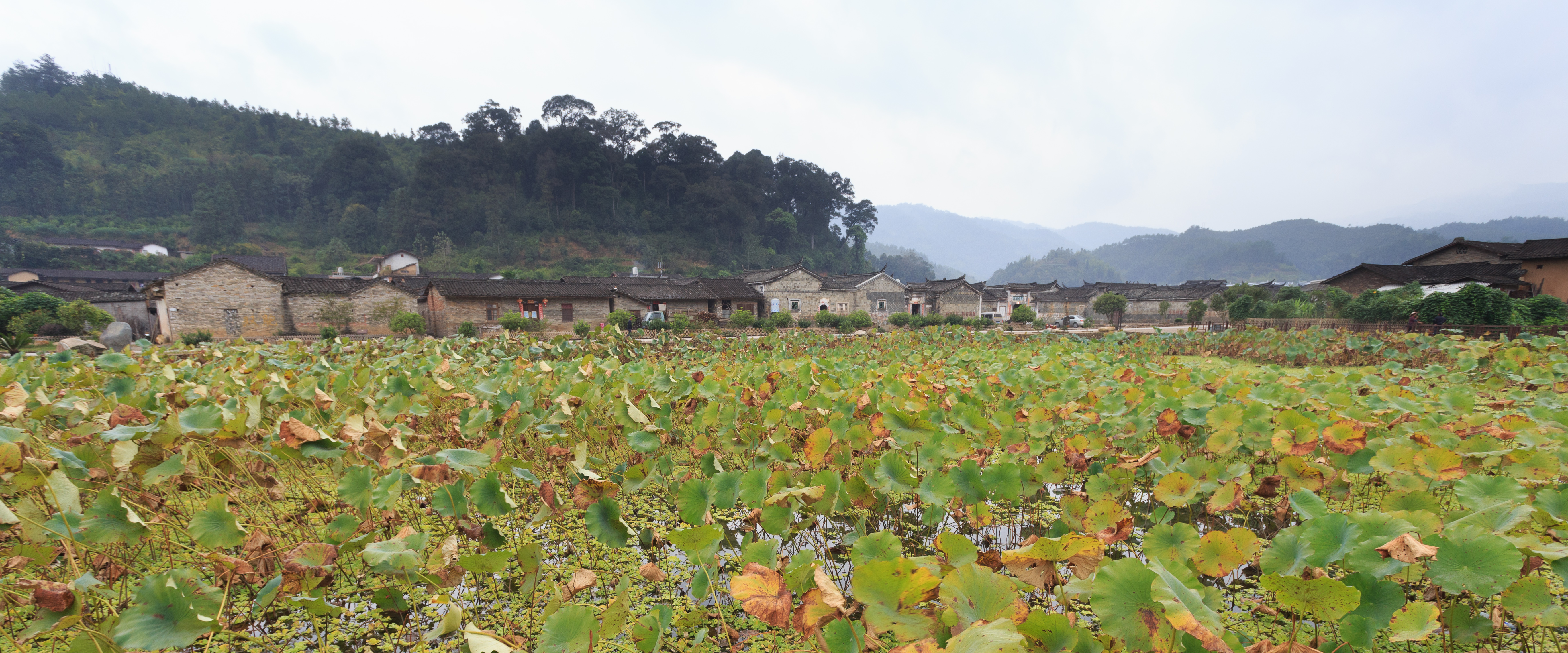 福建省连城县培田村—— 村口荷塘